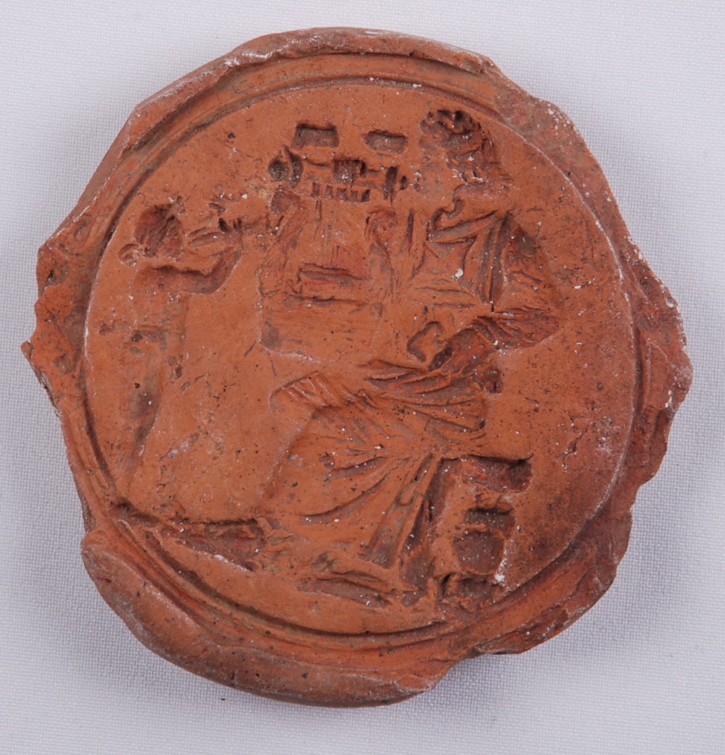 Srpski (latinica): Kalup za izradu medaljona i odlivak u pozitivu od keramike iz 2-3 veka. Potiče sa lokaliteta Pazarište u Maloj Kopašnici. Deo je antičke zbirke Narodnog muzeja u Leskovcu.